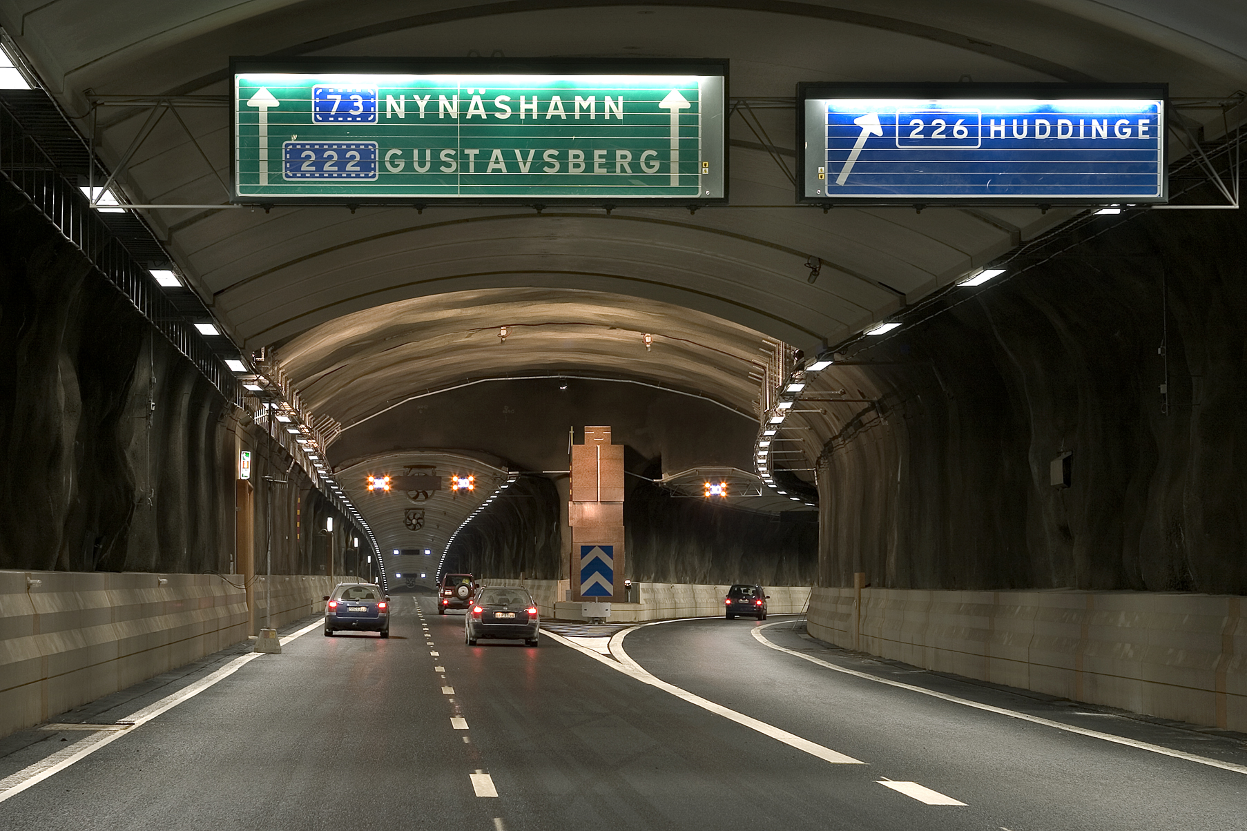 Södra länken i Stockholm. Konstnär: Tommy Östmar